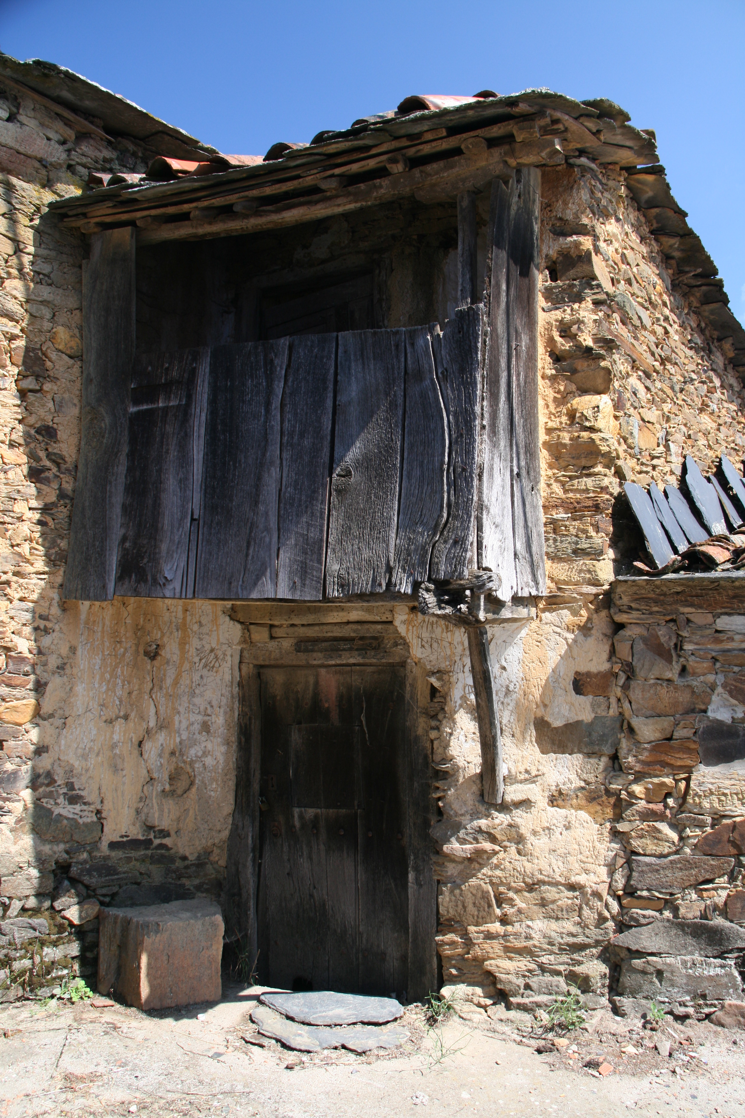 Pobladura - BAlcón